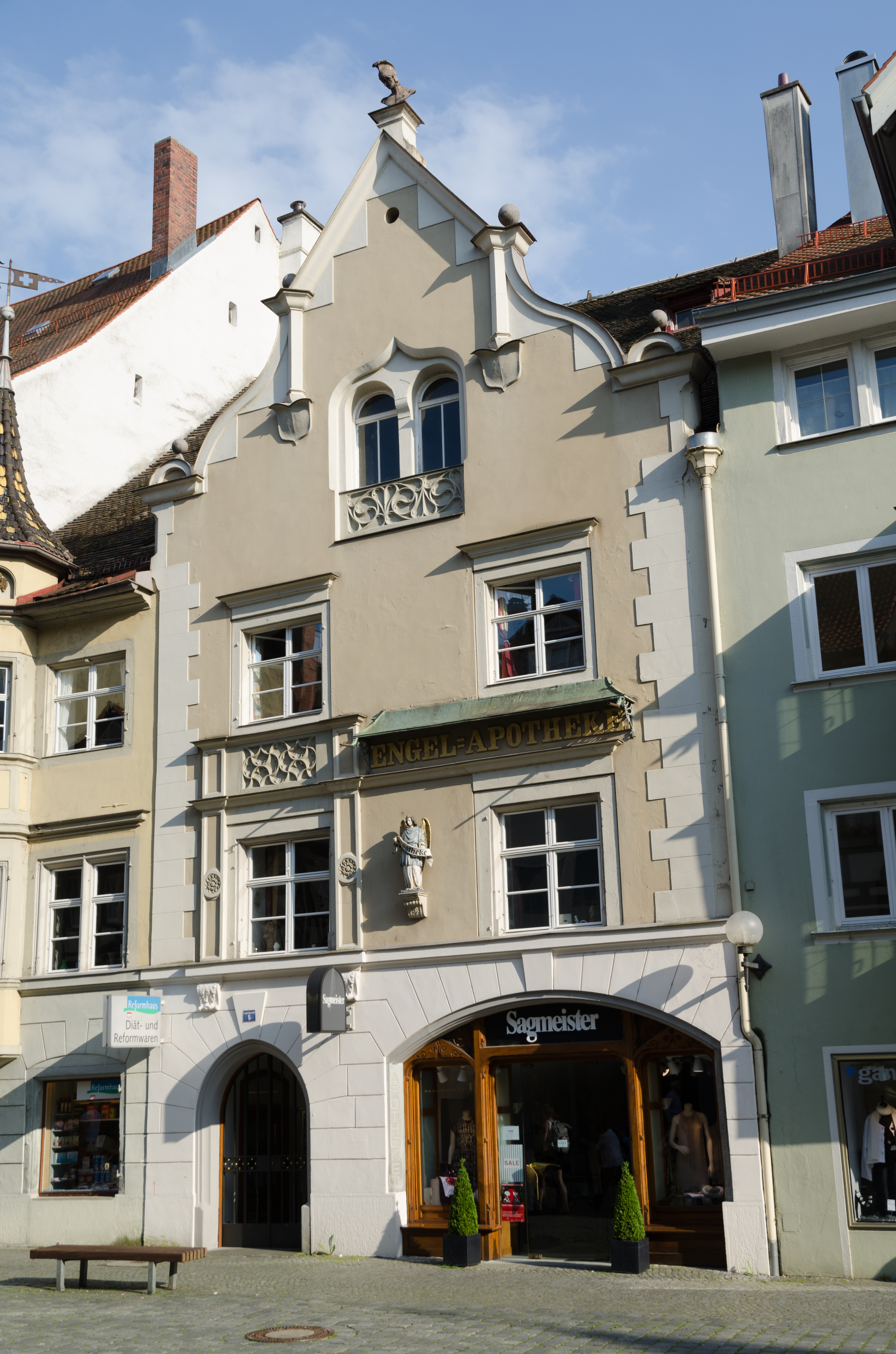 Lindau, Maximilianstraße 5